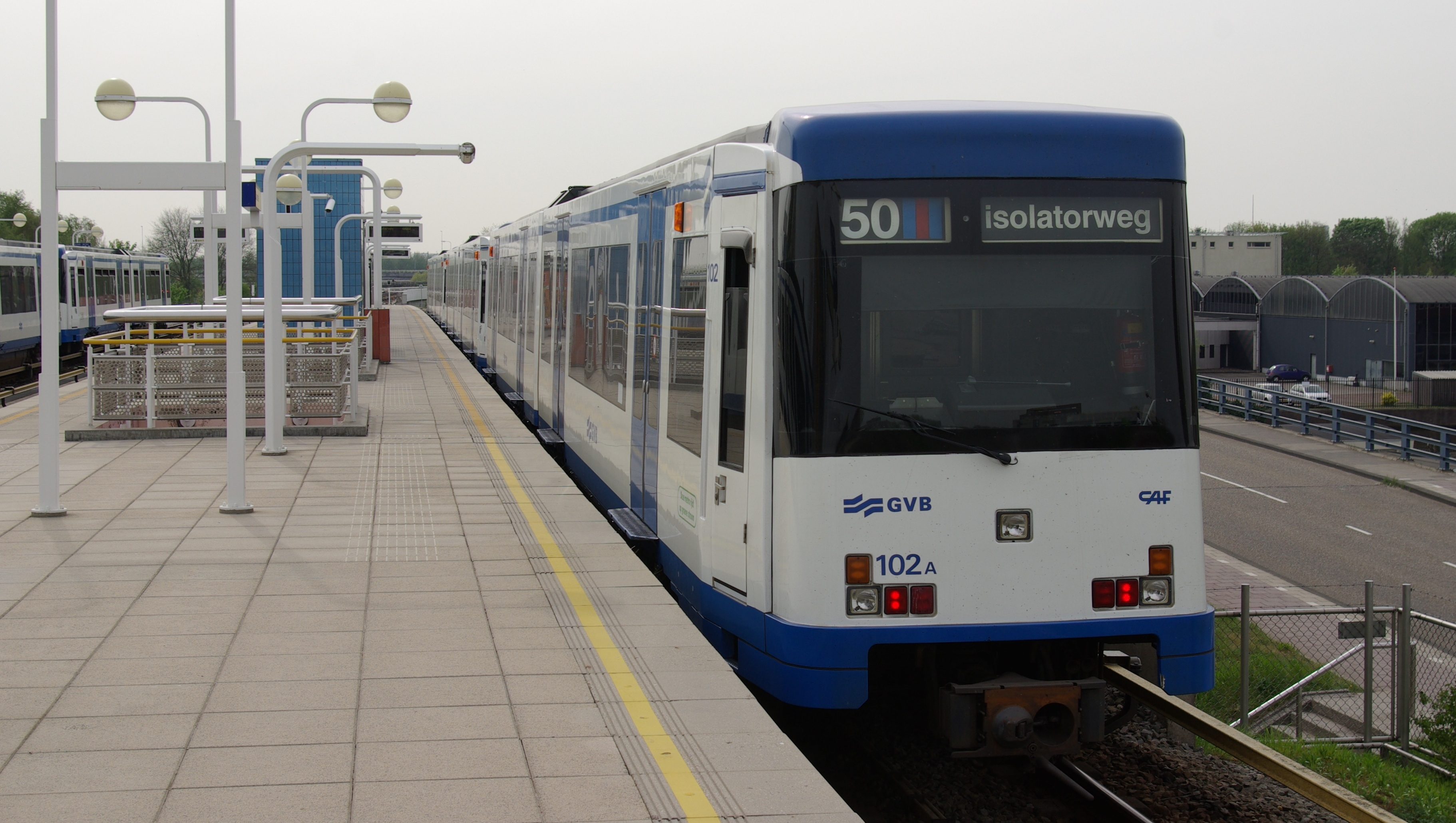 Metrostation Overamstel, Metro Amsterdam, treinstel CAF M4